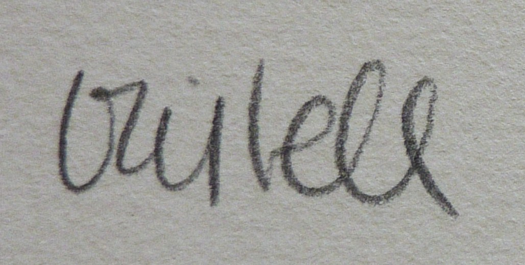 Signature de l'artiste catalane Assumpcio Oristrell